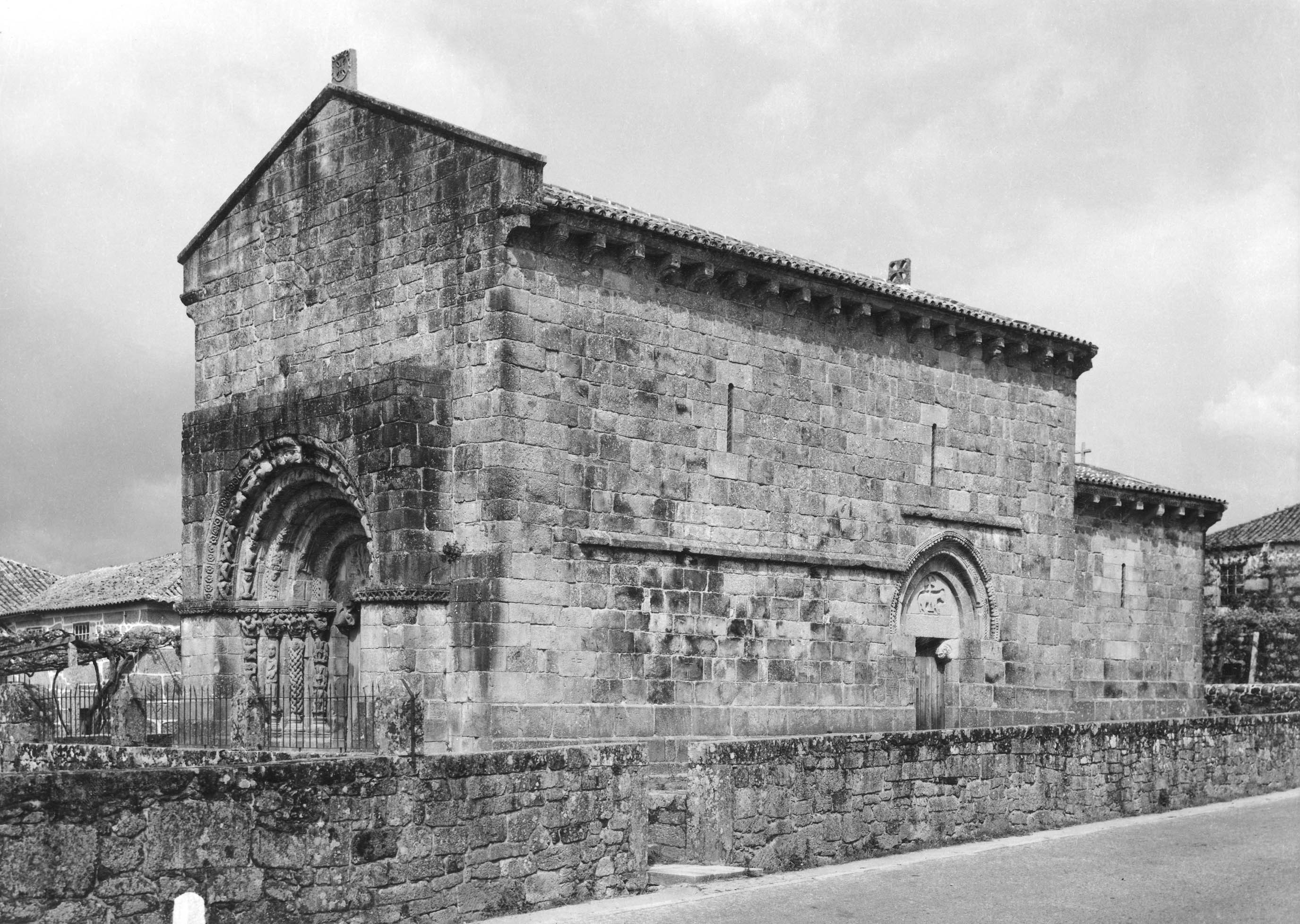 Vista geral. Fotógrafo: Mário Novais, 1899-1967. Orientador científico: Mário Tavares Chicó, 1905-1966. Data aproximada da produção da fotografia original: 1954. [CFT015.384.ic]